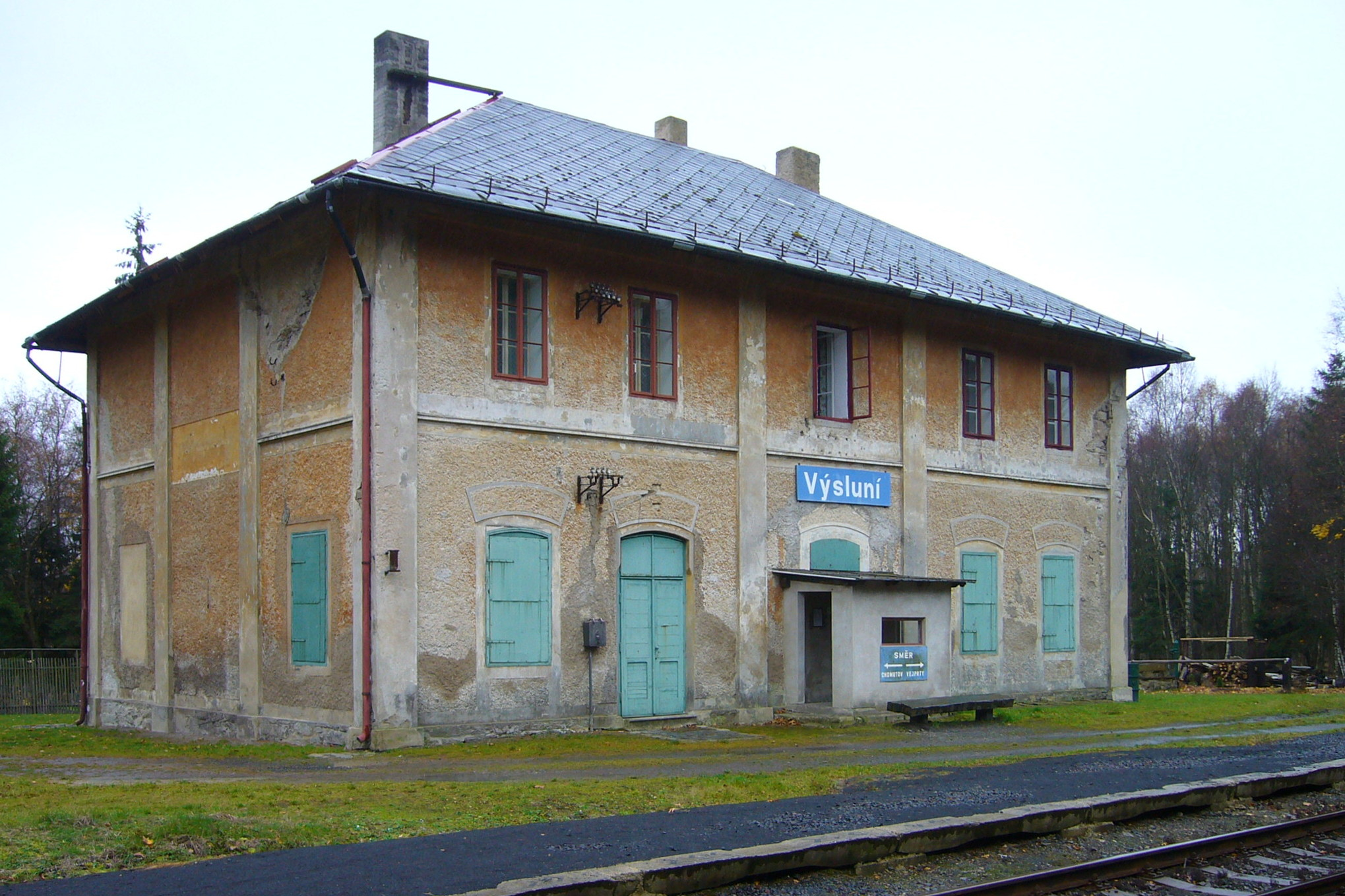 Výsluní – nádražní budova v roce 2006